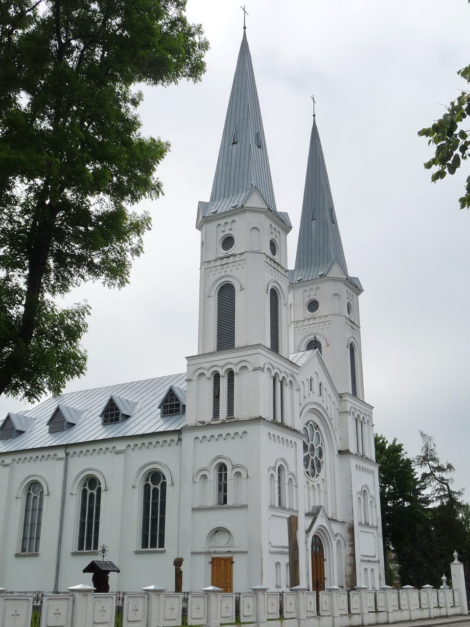 Sintautų Švč. Mergelės Marijos Ėmimo į dangų bažnyčia